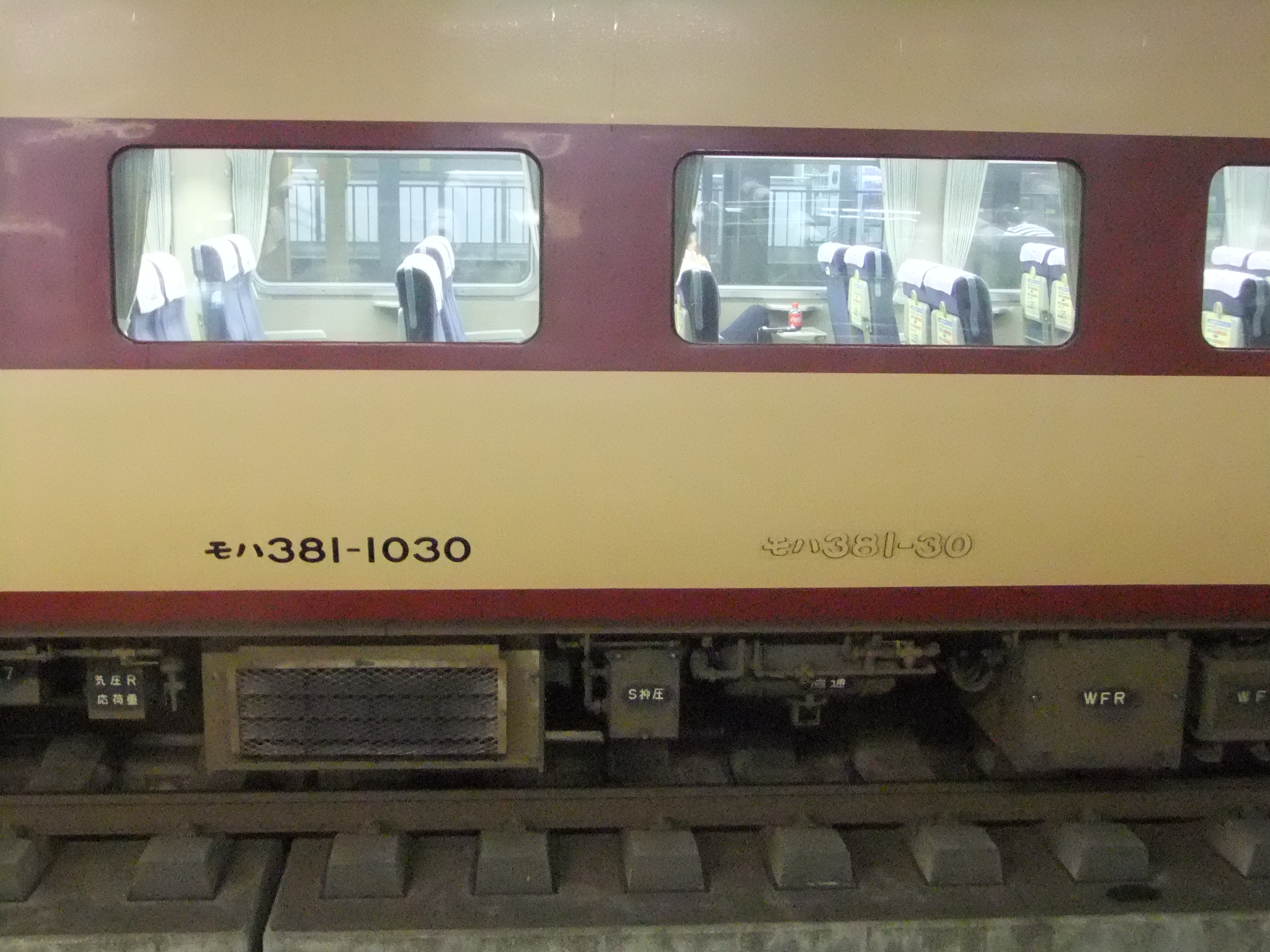 381系1000番台は元番号を塗りつぶし、新番号を横に記している。